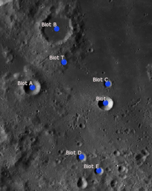 Cráter lunar Biot. Cráteres satélite. (Imagen LRO)